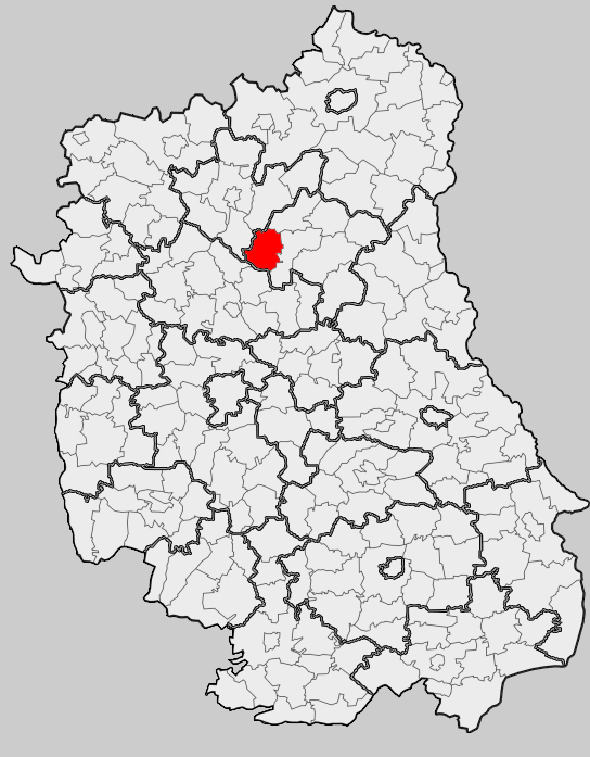 Map of gmina Siemień, Parczew county, Lublin voivodship Mapa gminy Siemień, powiat parczewski, województwo lubelskie